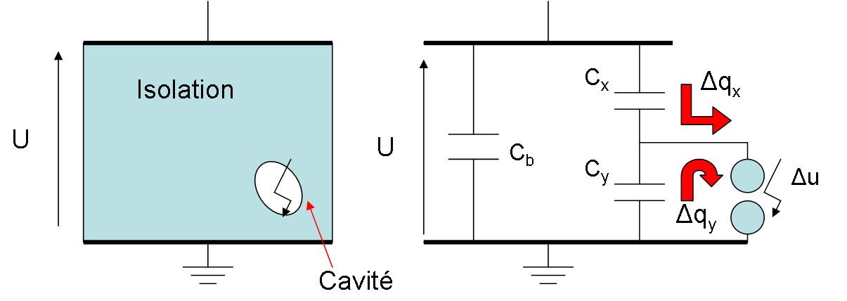 Schéma équivalent d'une décharge partielle dans un isolement.